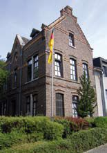 Das Kardinal-Frings-Haus in Quadrath-Ichendorf.